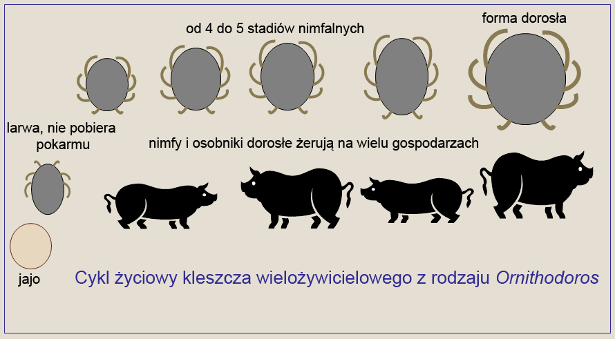 Schemat cyklu życiowego kleszcza wielożywicielowego na przykładzie przedstawiciela grupy gatunków Ornithodoros moubata, żerującego na świniach.